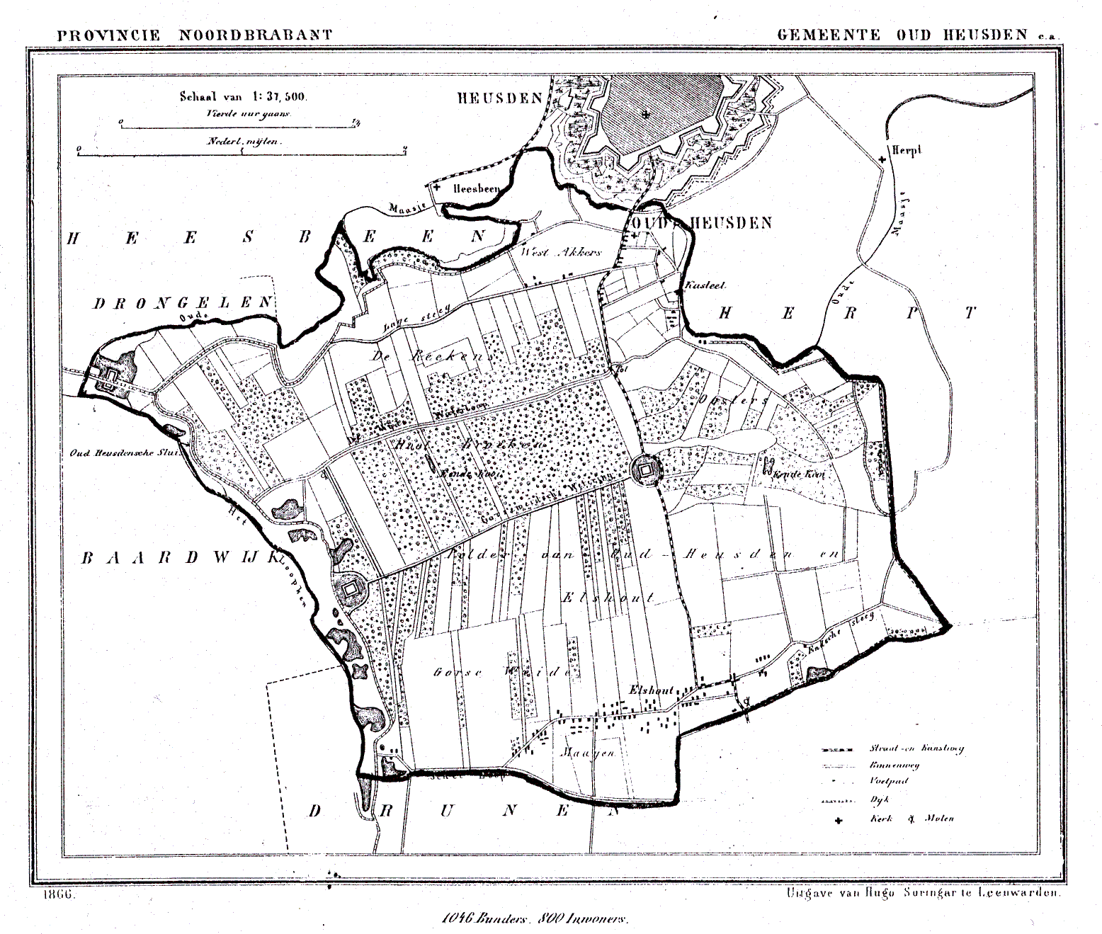 Nederland, Noord-Brabant, Gemeente Oud-Heusden